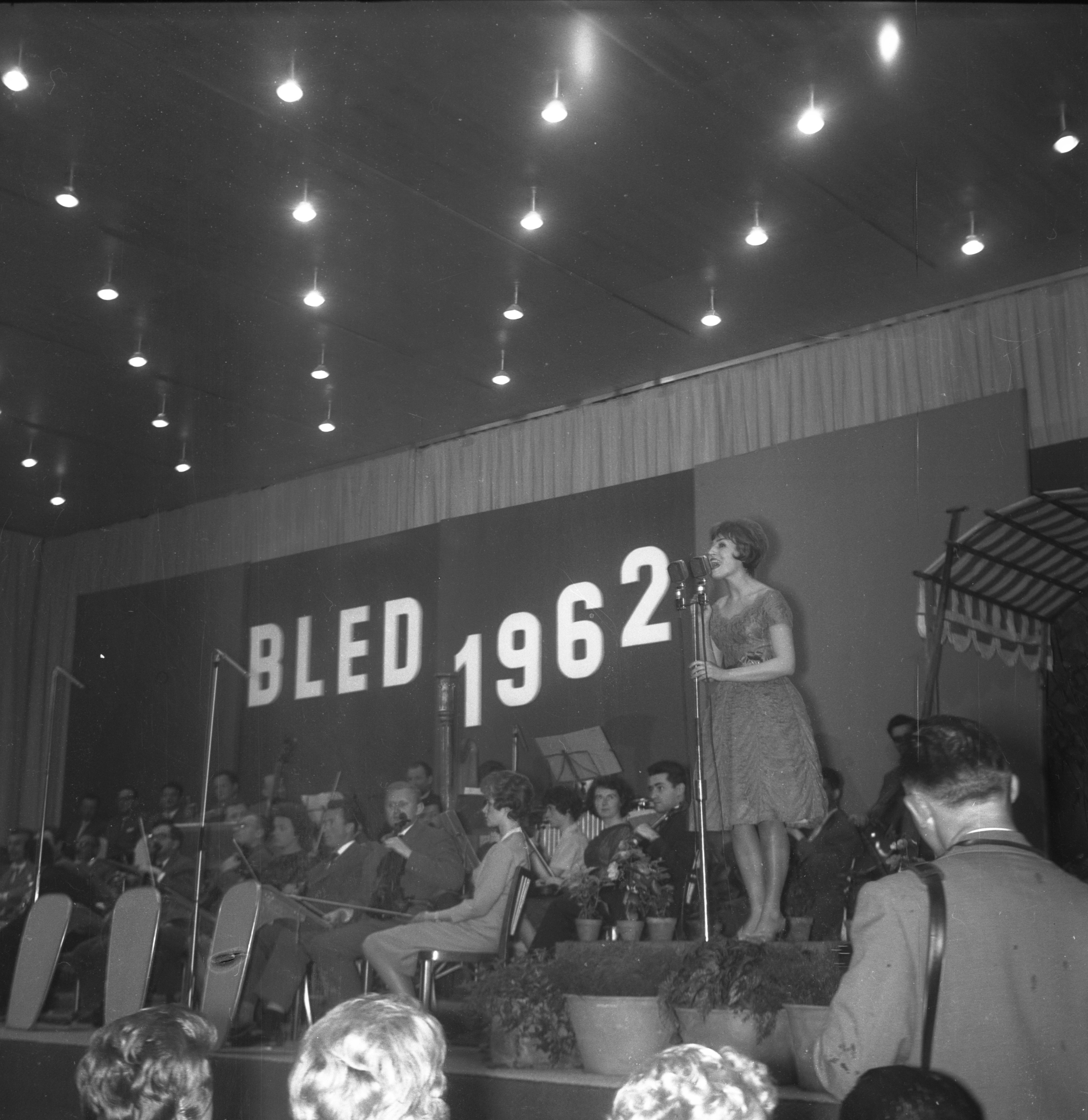 Marjana Deržaj na Slovenski popevki.